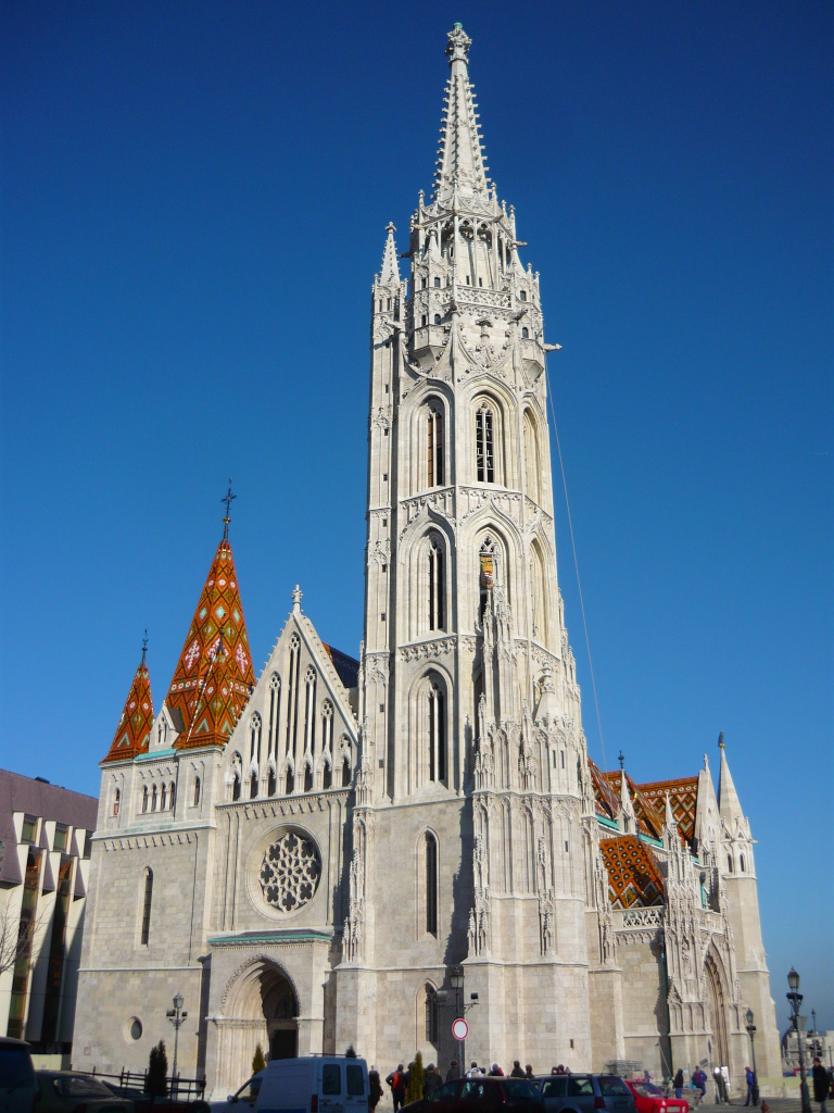 Matthias Church, Budapest